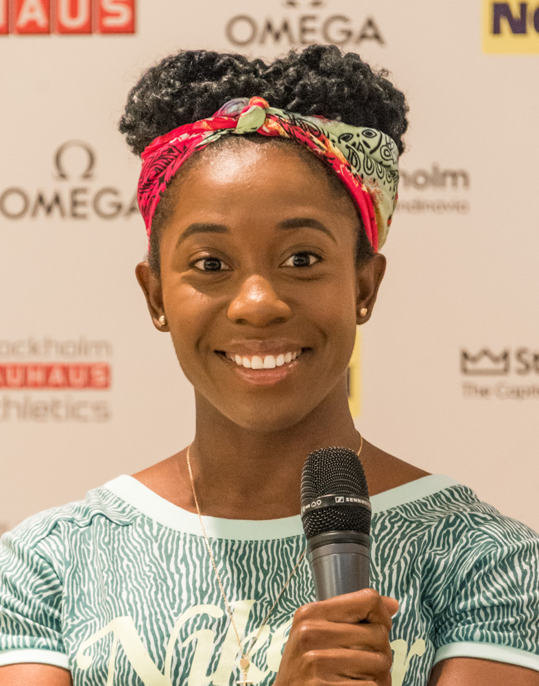 Shelly-Ann Fraser-Pryce inför Bauhaus-galan (Diamond League) i Stockholm 2015.